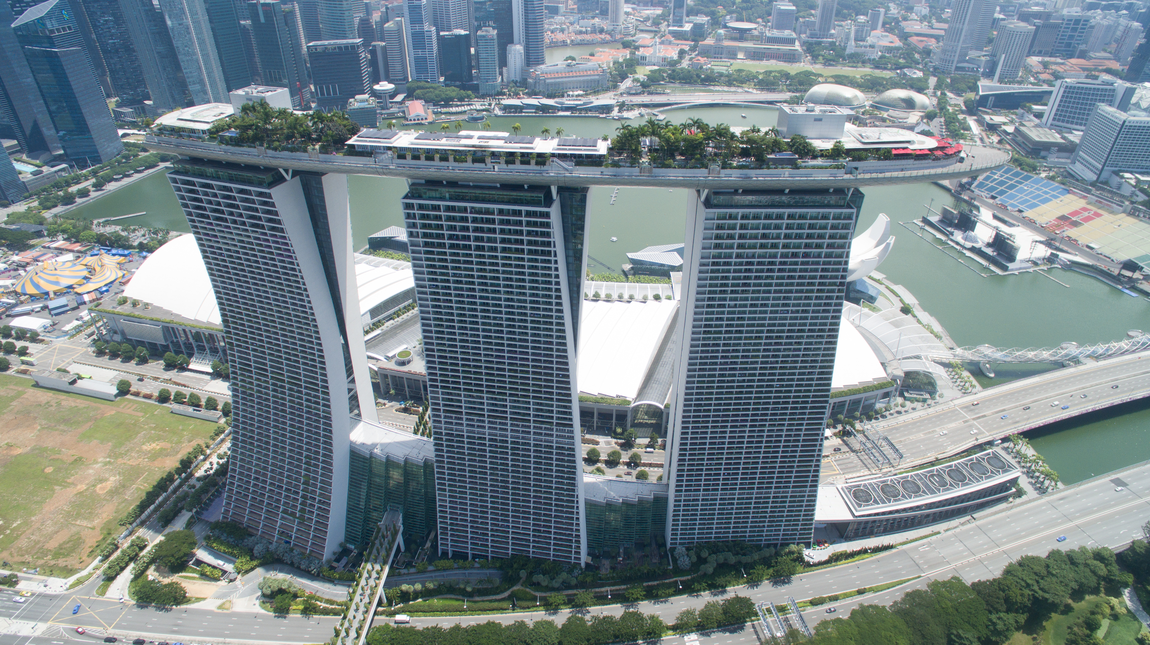 Luftbild Marina Bay Sands Hotel Singapur